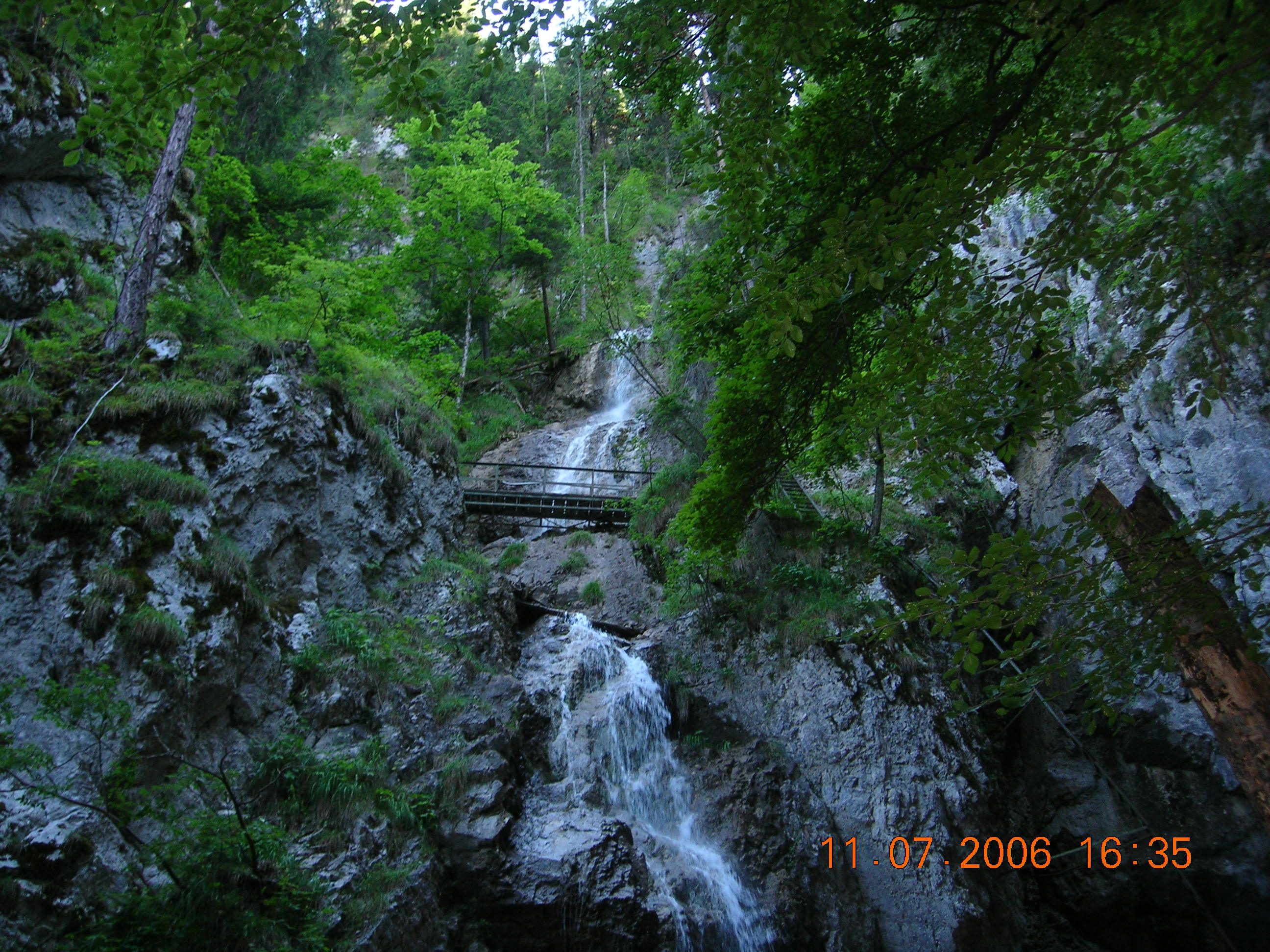 Slovenský Raj